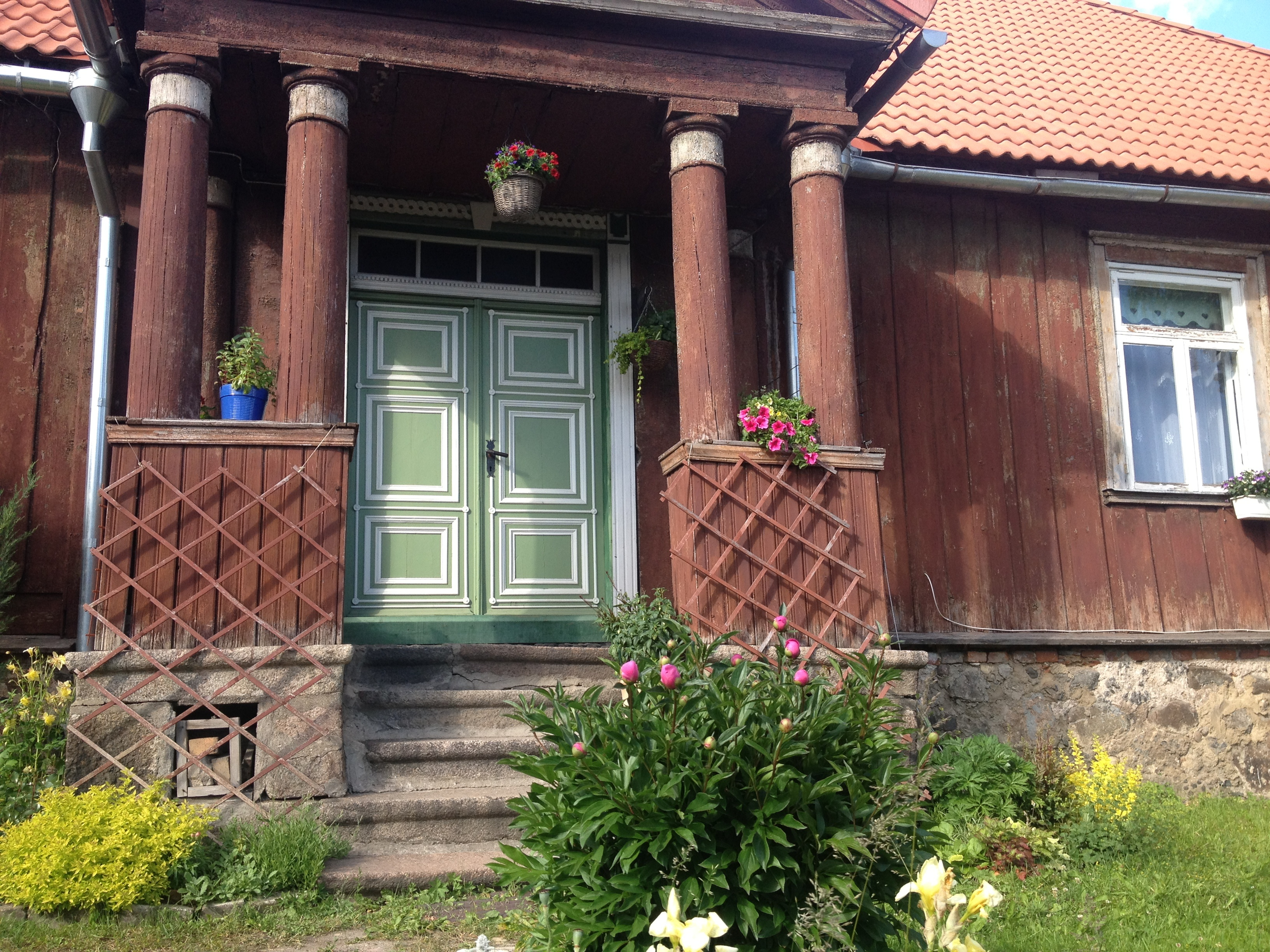 Elamu Viljandis, Tartu tn 19